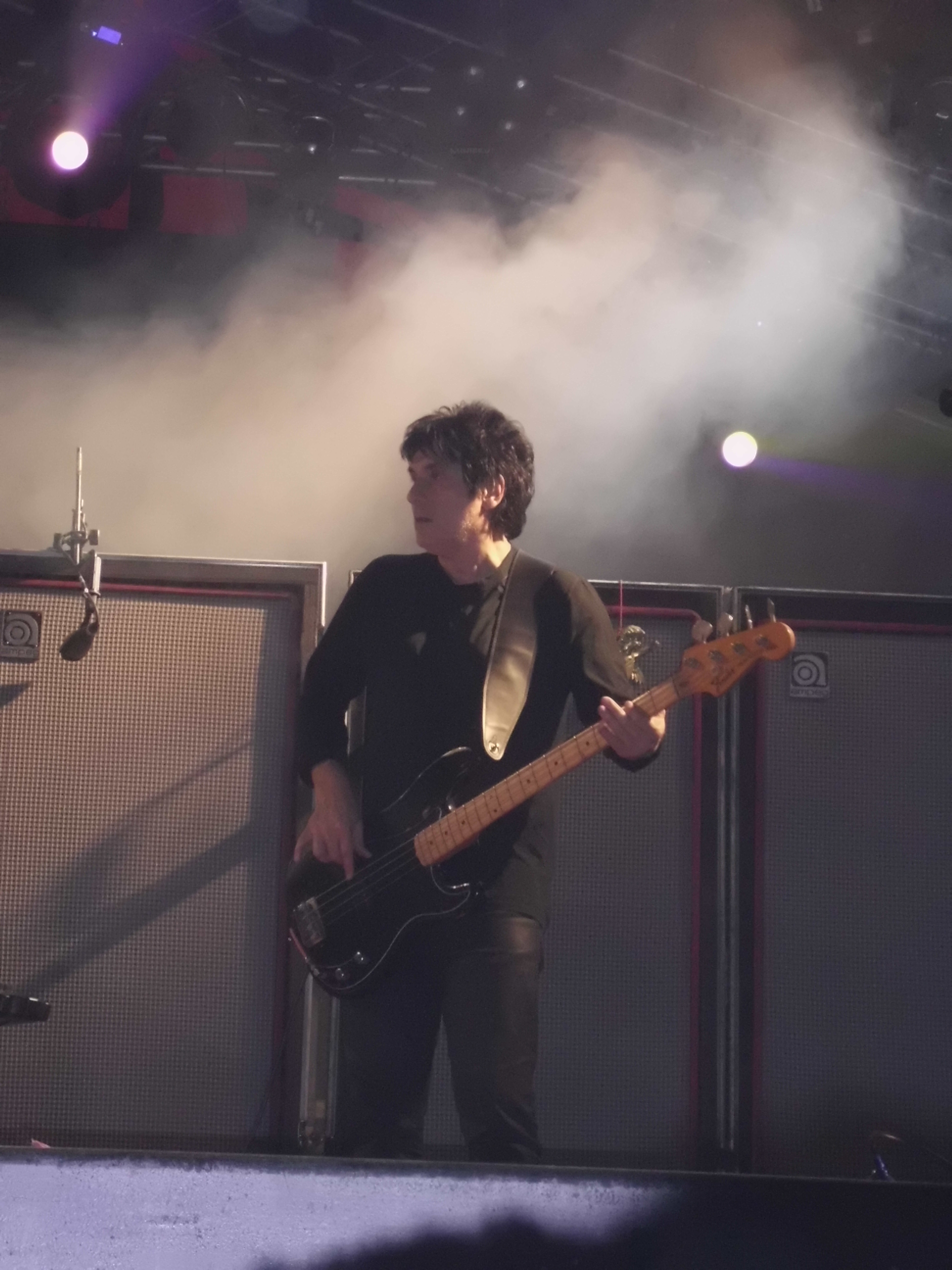 Imagen tomada el dia 3 de septiembre de 2011 en Mendoza, Argentina